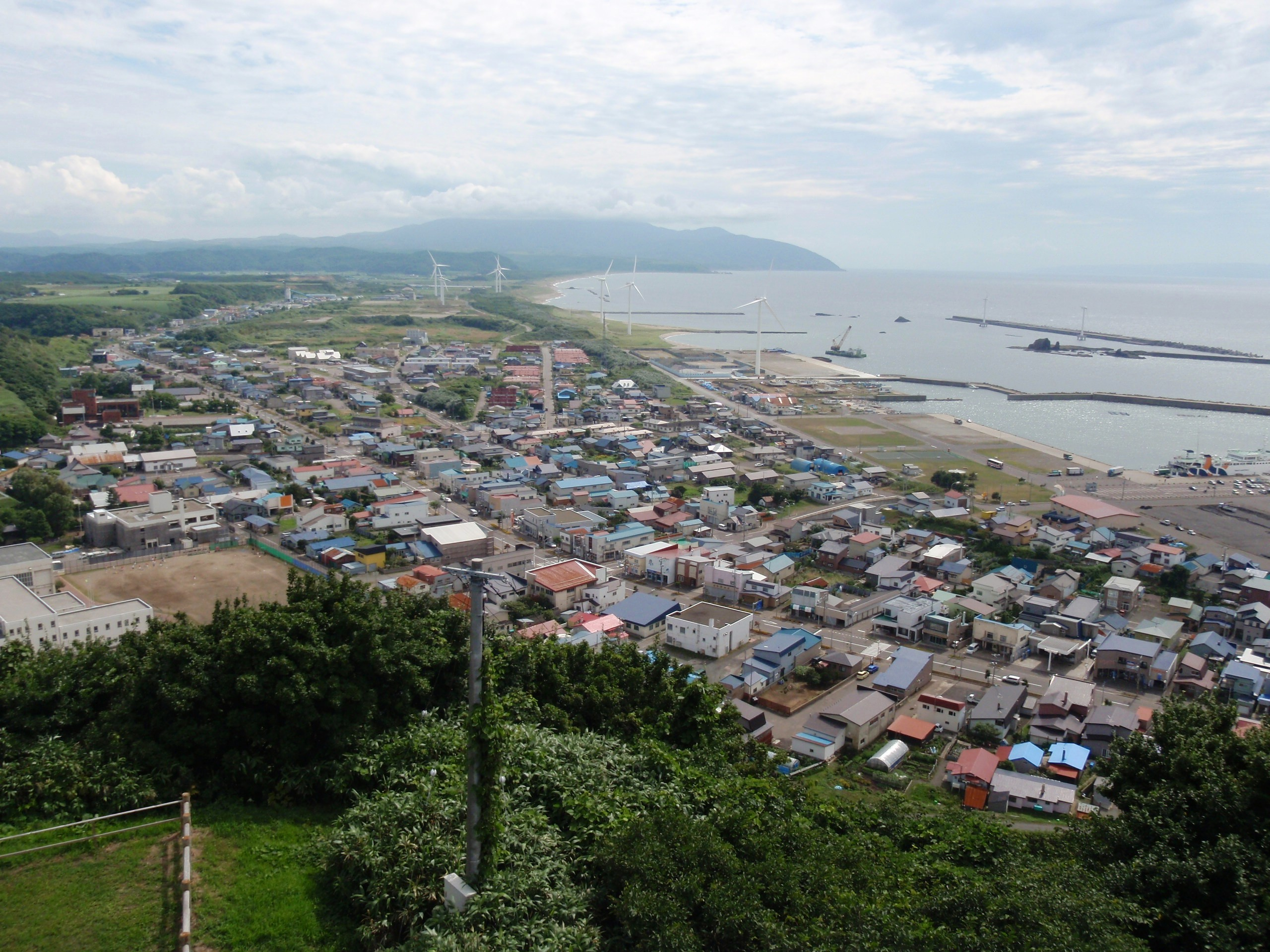 立象山から見る瀬棚市街地